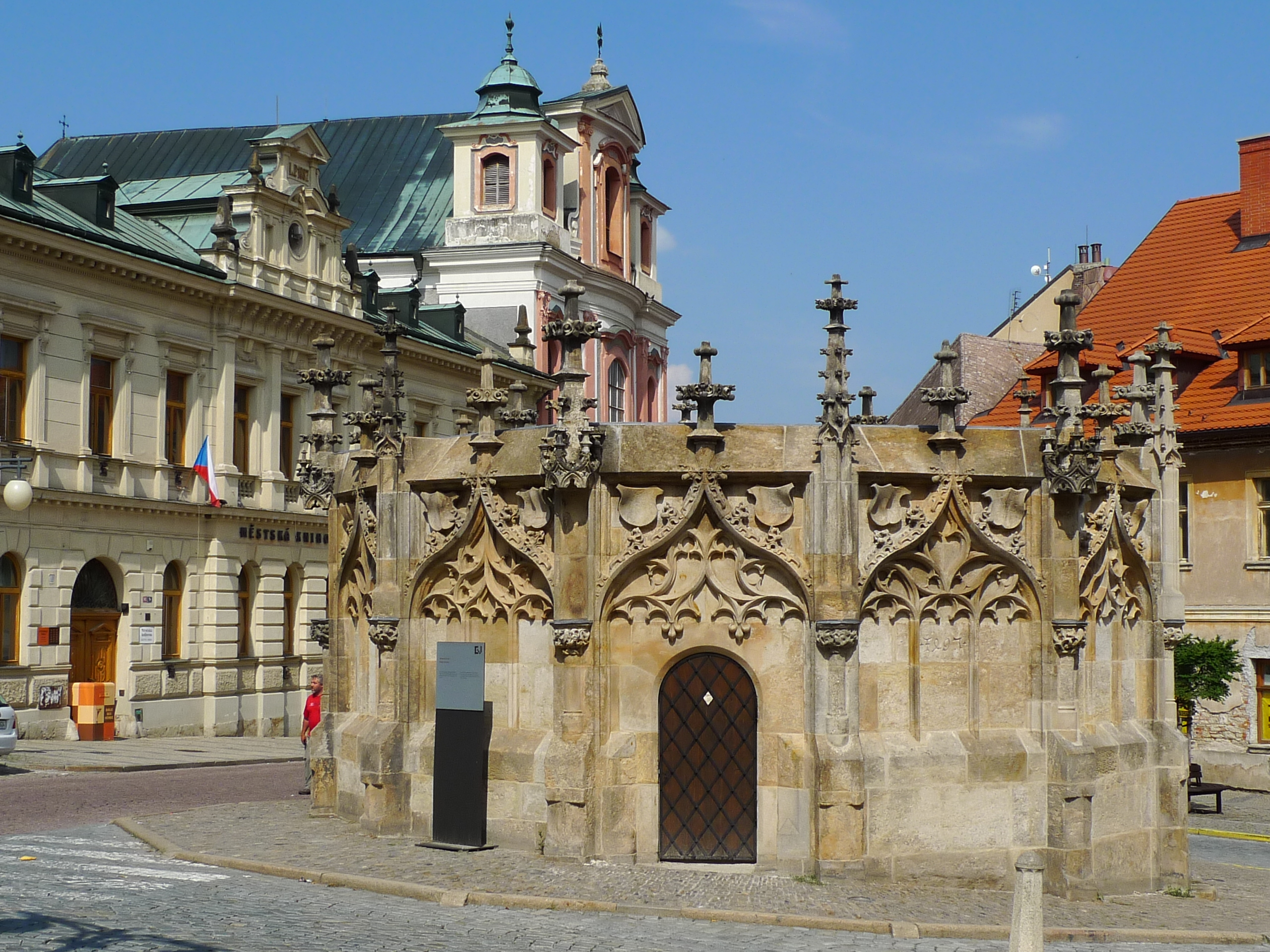 Rejskova kašna (Kutná Hora), Rejskovo nám., Kutná Hora